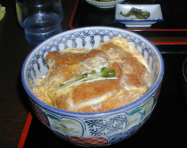 Katsudon La foto è stata scattata da me a Kotohira (Giappone) nell'agosto 2002